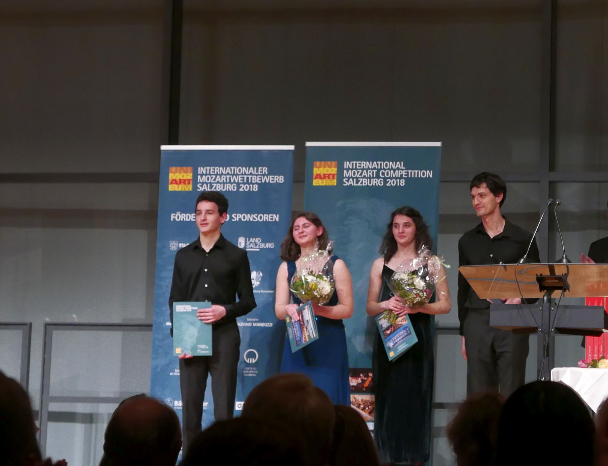 Internationaler Mozartwettbewerb 2018 Streichquartett Preisverleihung:Quatour Tchalik (1. Preis)